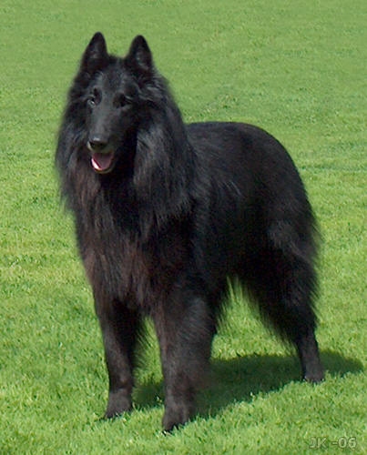 European Groenendael male, Jack Cerny Habakuk